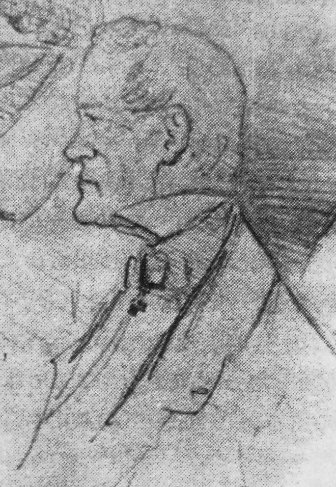 12-й орловский губернатор Валериан Иванович Сафонович